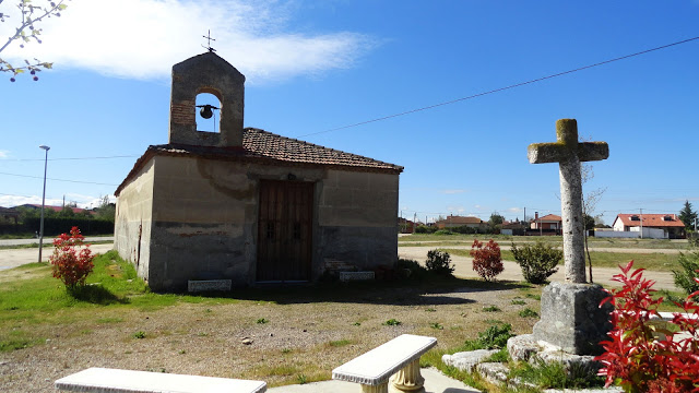 La Ermita del Santo Cristo del Humilladero, que data del siglo XVIII.